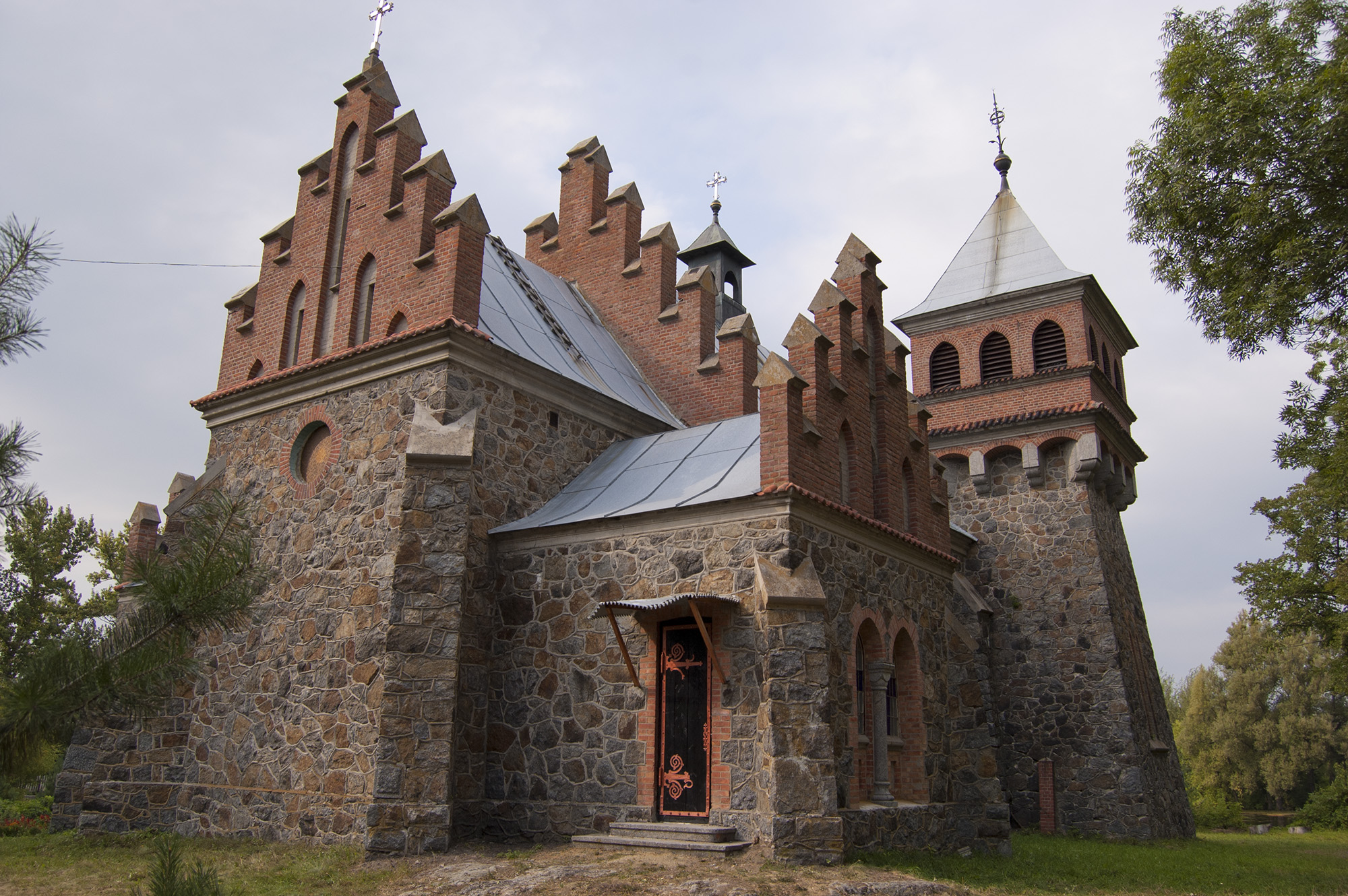 Костьол Св.Клари, с.Городківка